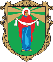 Герб Млинівського району Рівненської області України }